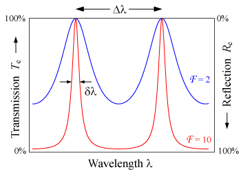 Etalon transmission plot